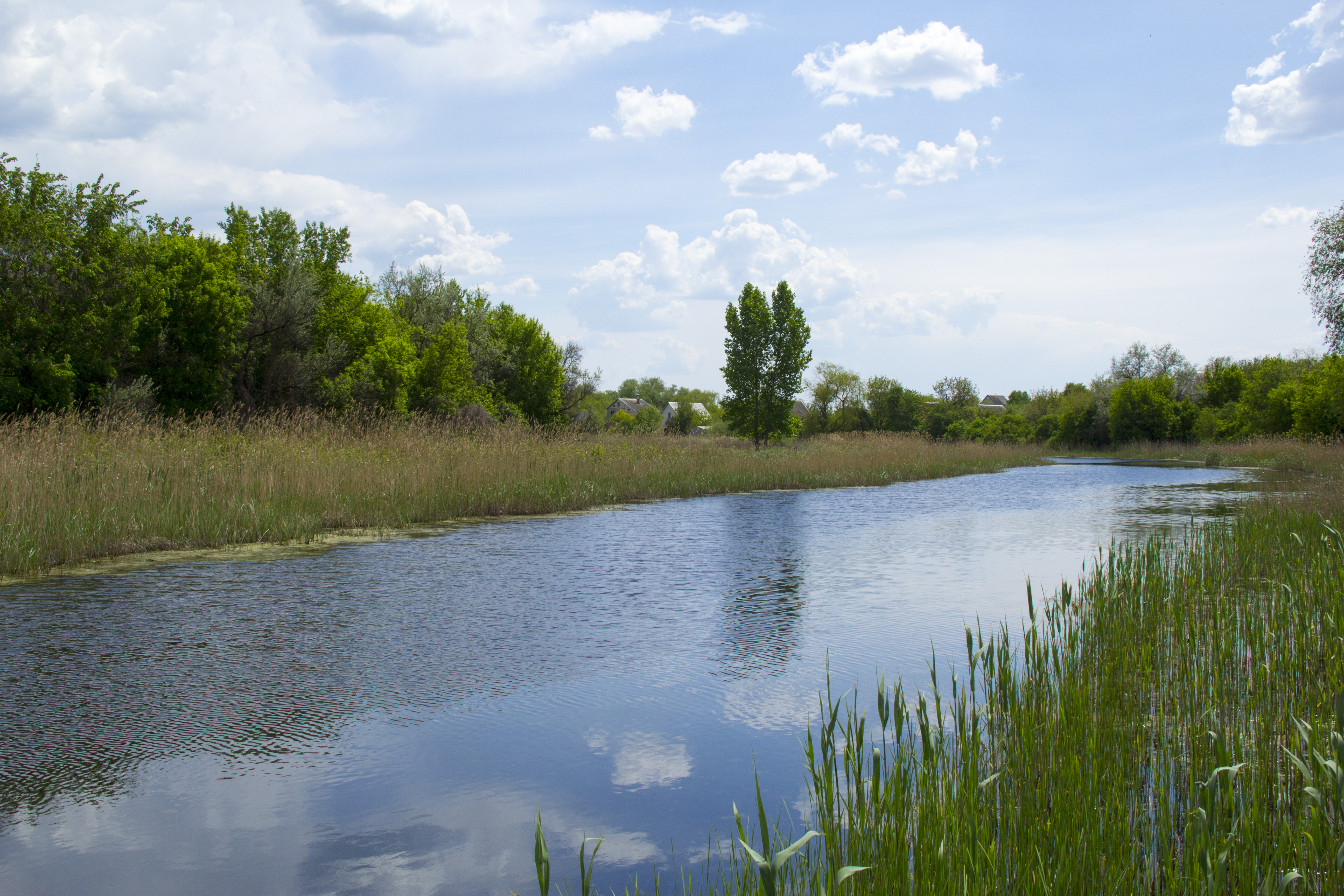 Кільченський, Дніпропетровський р-н, м. Підгородне